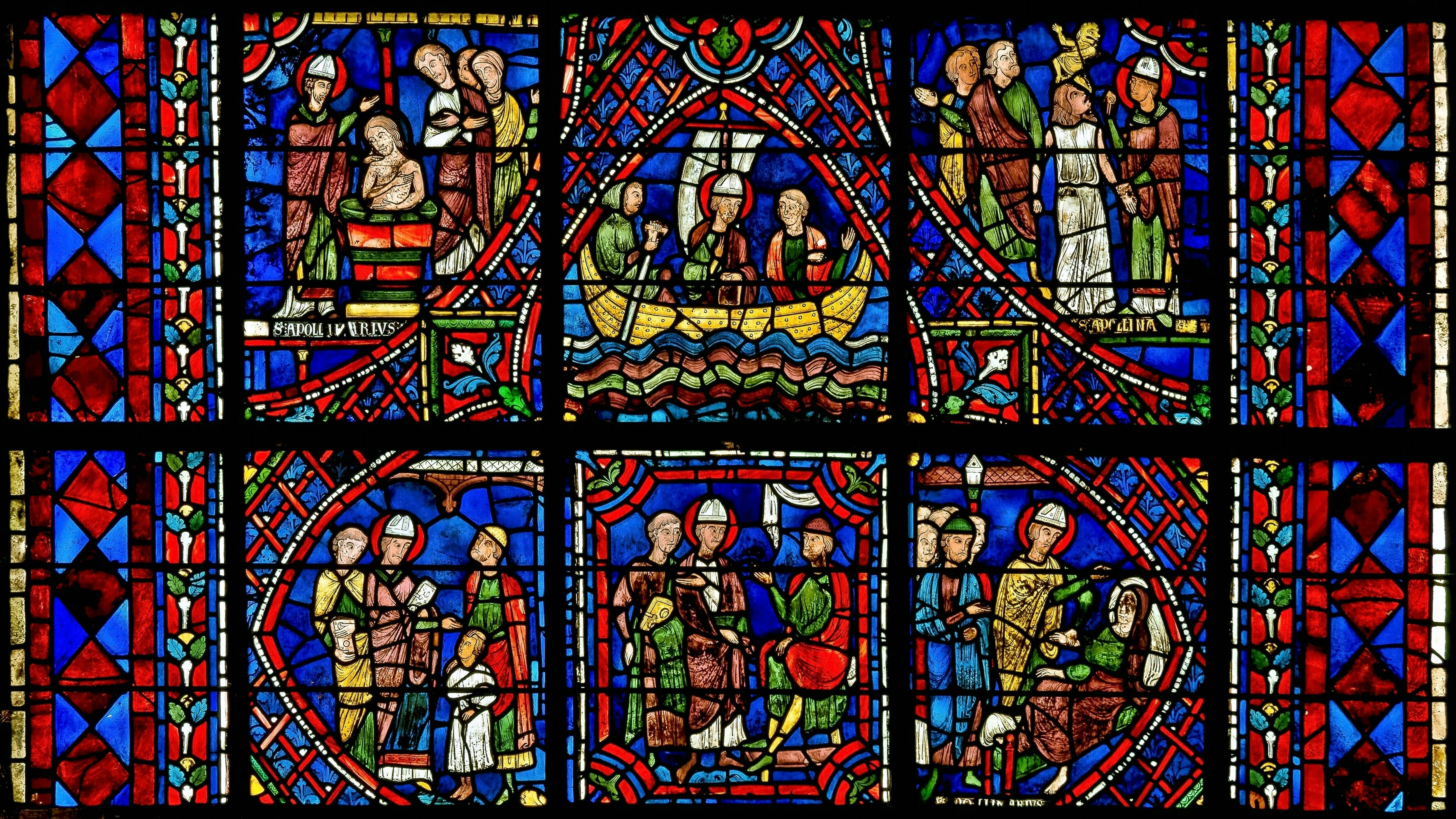 Das Apollinarisfenster erzählt in einer Vielzahl von Einzelszenen das Leben des Heiligen Apollinaris. Die Bildergeschichte ist zu lesen von links nach rechts und von unten nach oben.